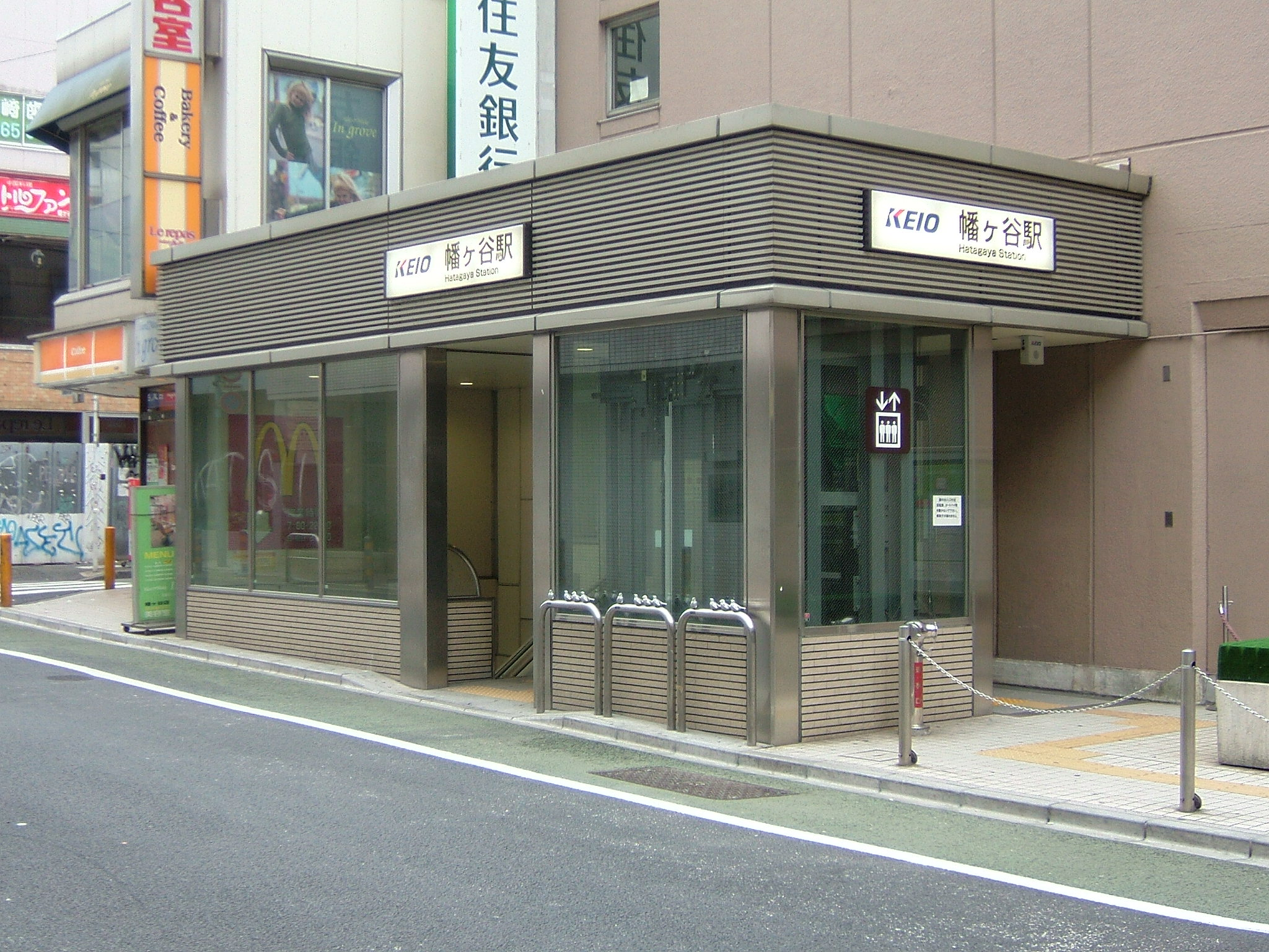 京王線幡ヶ谷駅入口とエレベータ（幡ヶ谷ゴールデンセンター）